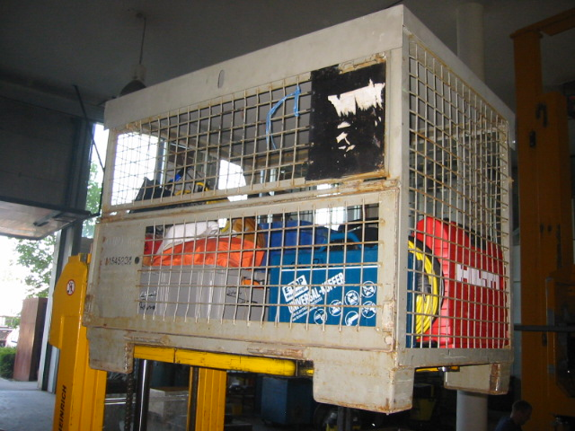 Gitterboxpalette auf Gabelstapler